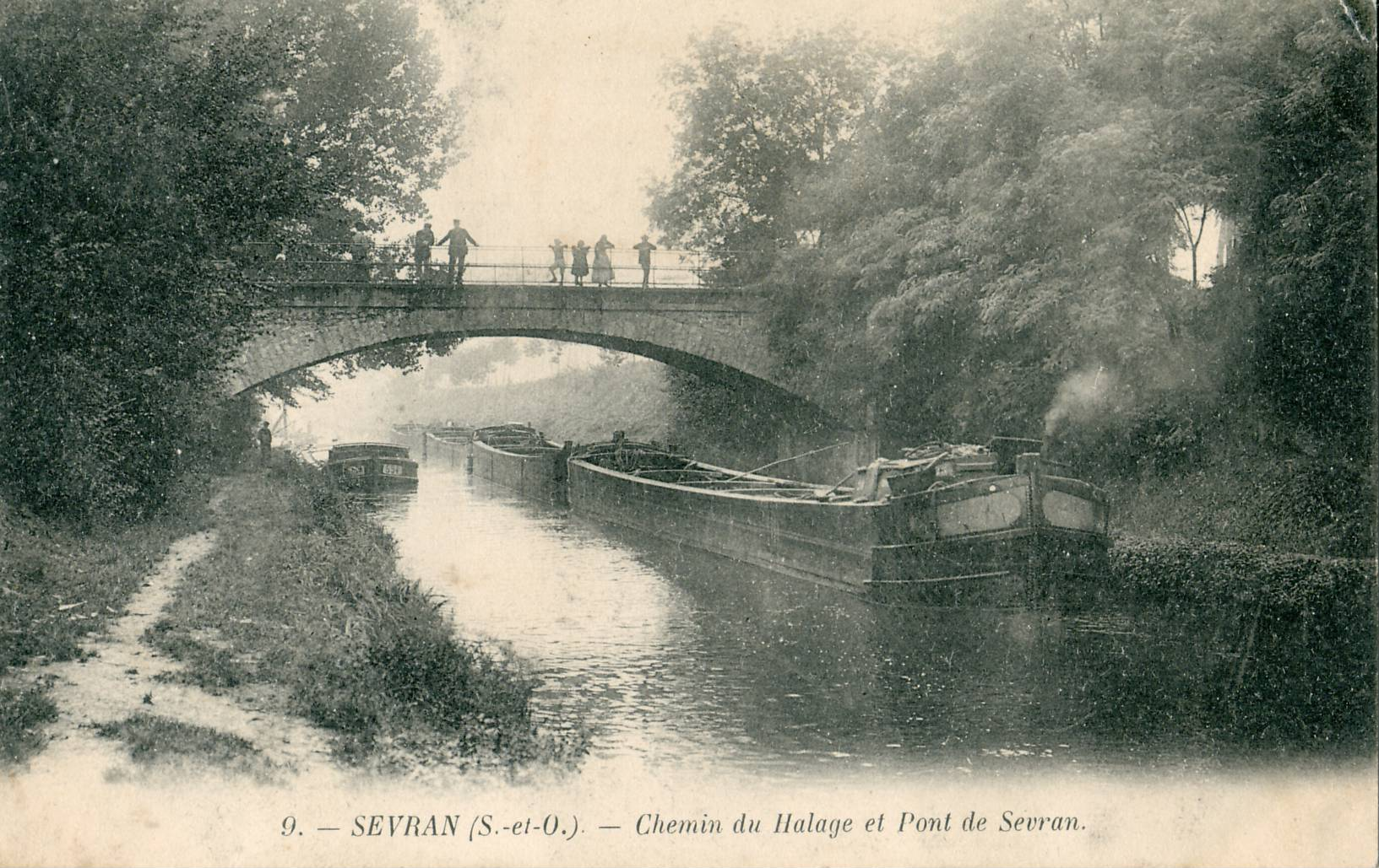 Carte postale ancienne, sans indication d'éditeur, N°9SEVRAN : Chemin de halage et pont de SevranIl s'agit du Canal de l'Ourcq et on distingue bien les péniches qui y circulaient, dites "flutes" et "demi-flutes" de l'Ourcq